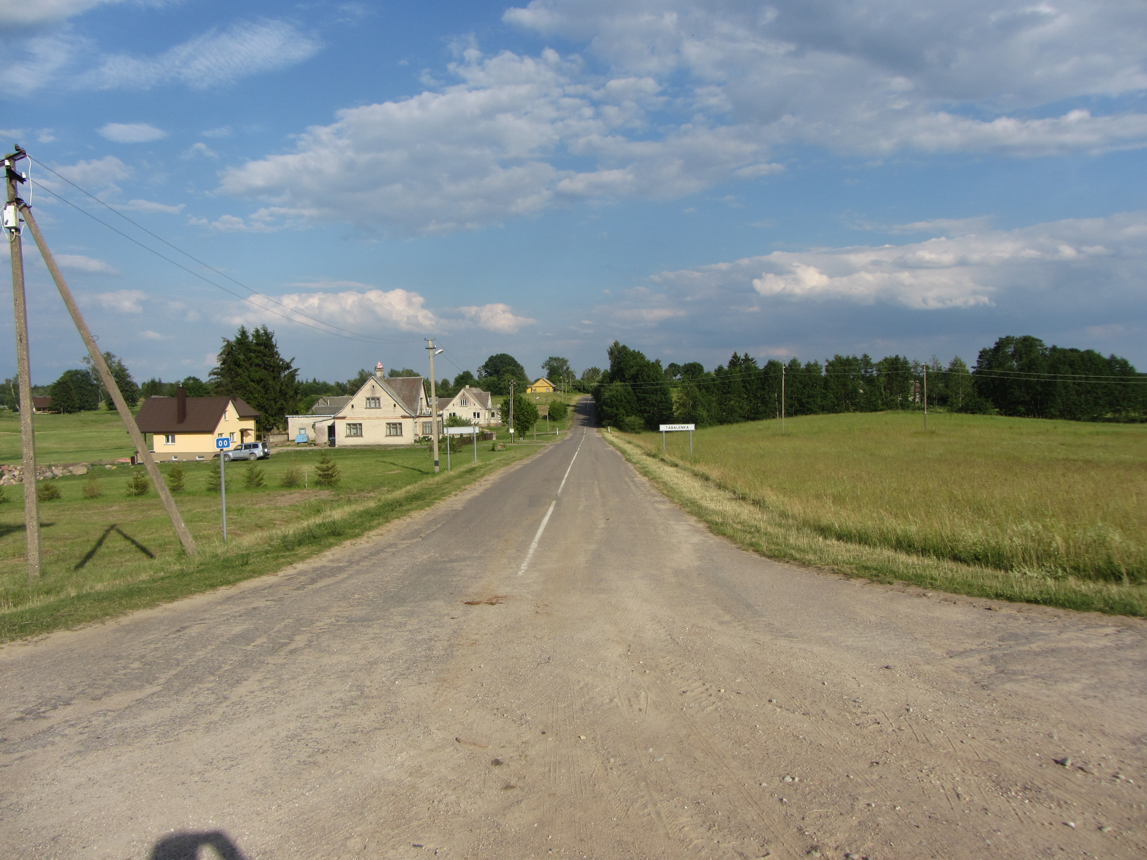 Tabalenka, Lithuania